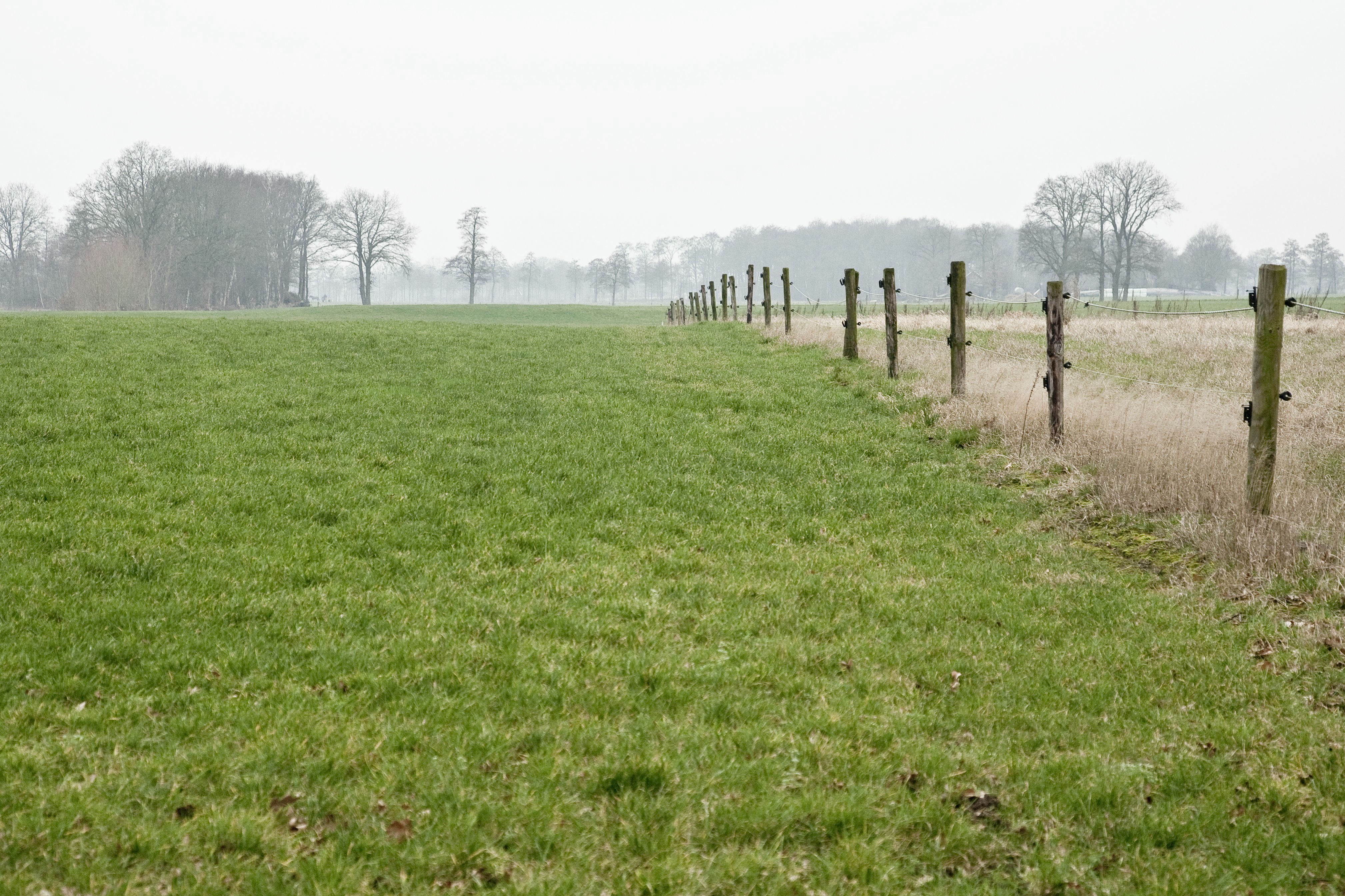 De Linderbeek: Overzicht landschap met stroomruggen in het Beekdal (opmerking: Publicatie: Mens en land in het hart van Salland (Landschapsbiografie Oost-Nederland))